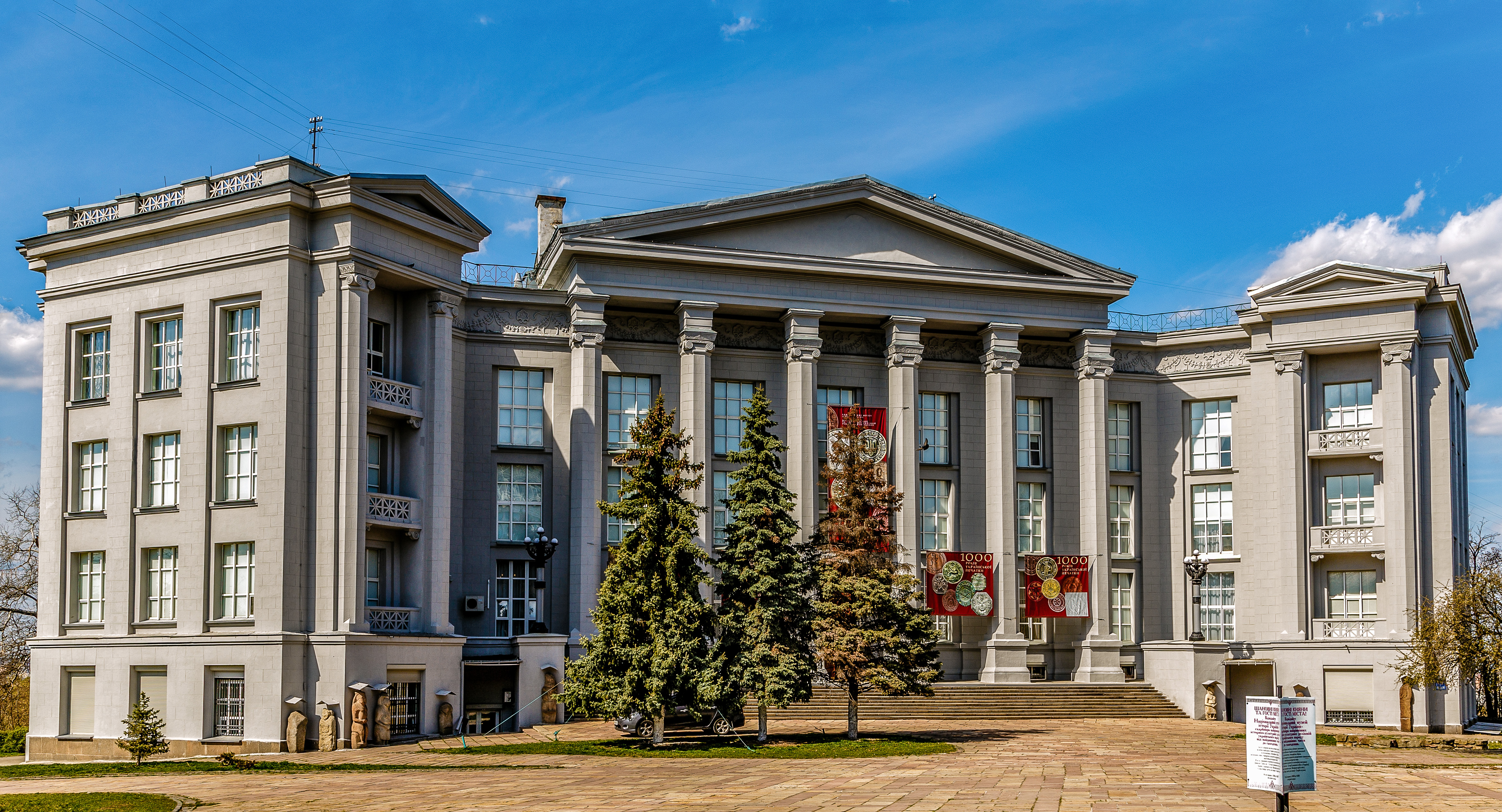 Здание Киевской художественной школы (с 1944 г. Национальный музей истории Украины), 1937-39 гг., арх. И.Ю. Каракис